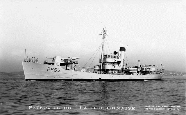 Patrouilleur auxiliaire La Toulonnaise